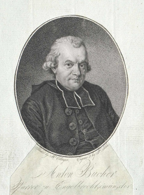 Anton Bucher (1746-1817) bayerischer Priester, Adeliger und Gelehrter